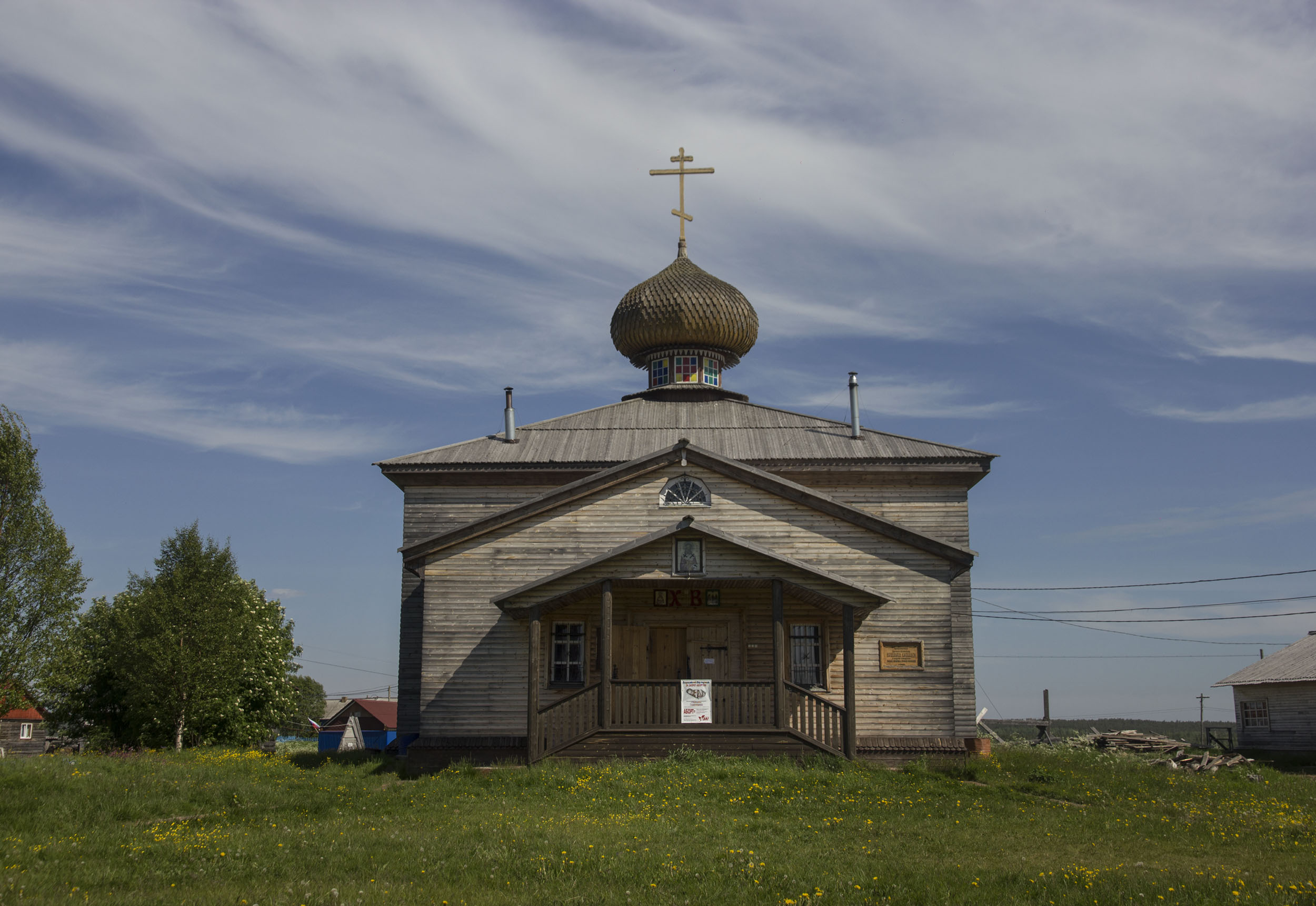 Церковь Св. Афанасия Александрийского и Св. Зосимы и Савватия Соловецких: улица Успенская, 21а, Варзуга, Терский район, Мурманская область